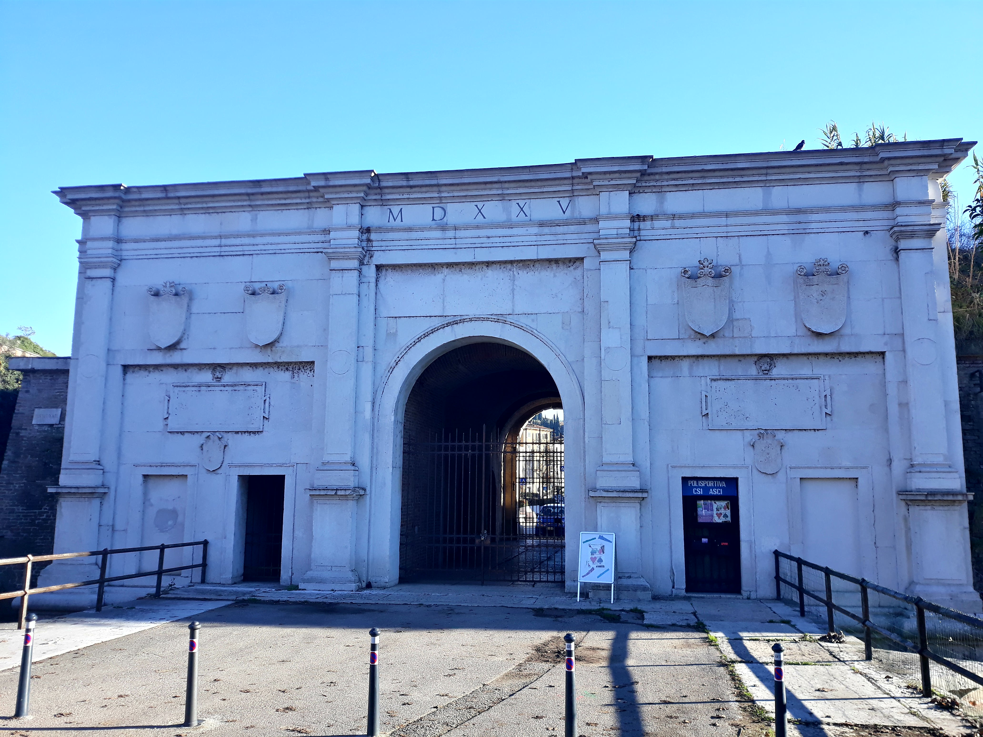 Porta San Giorgio a Verona